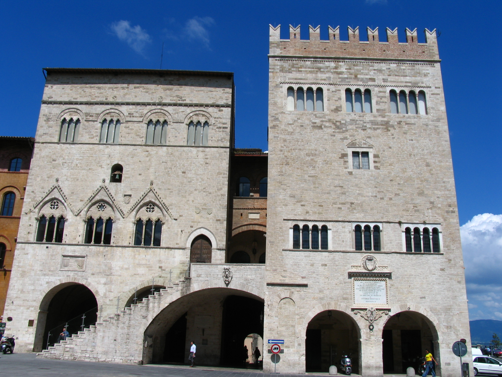 Palazzo del Capitano e Palazzo del Popolo, Todi, Umbria, ItaliaPalazzo del Capitano and Palazzo del Popolo, Todi, Perugia, Umbria, Italy